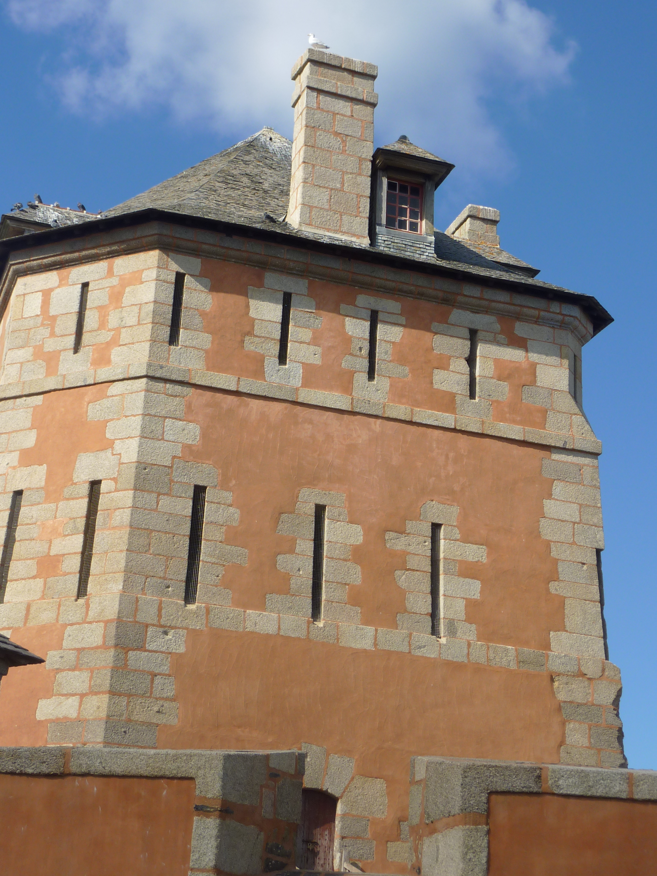 Camaret: la tour Vauban côté mer et lesimpacts de boulets encore visibles